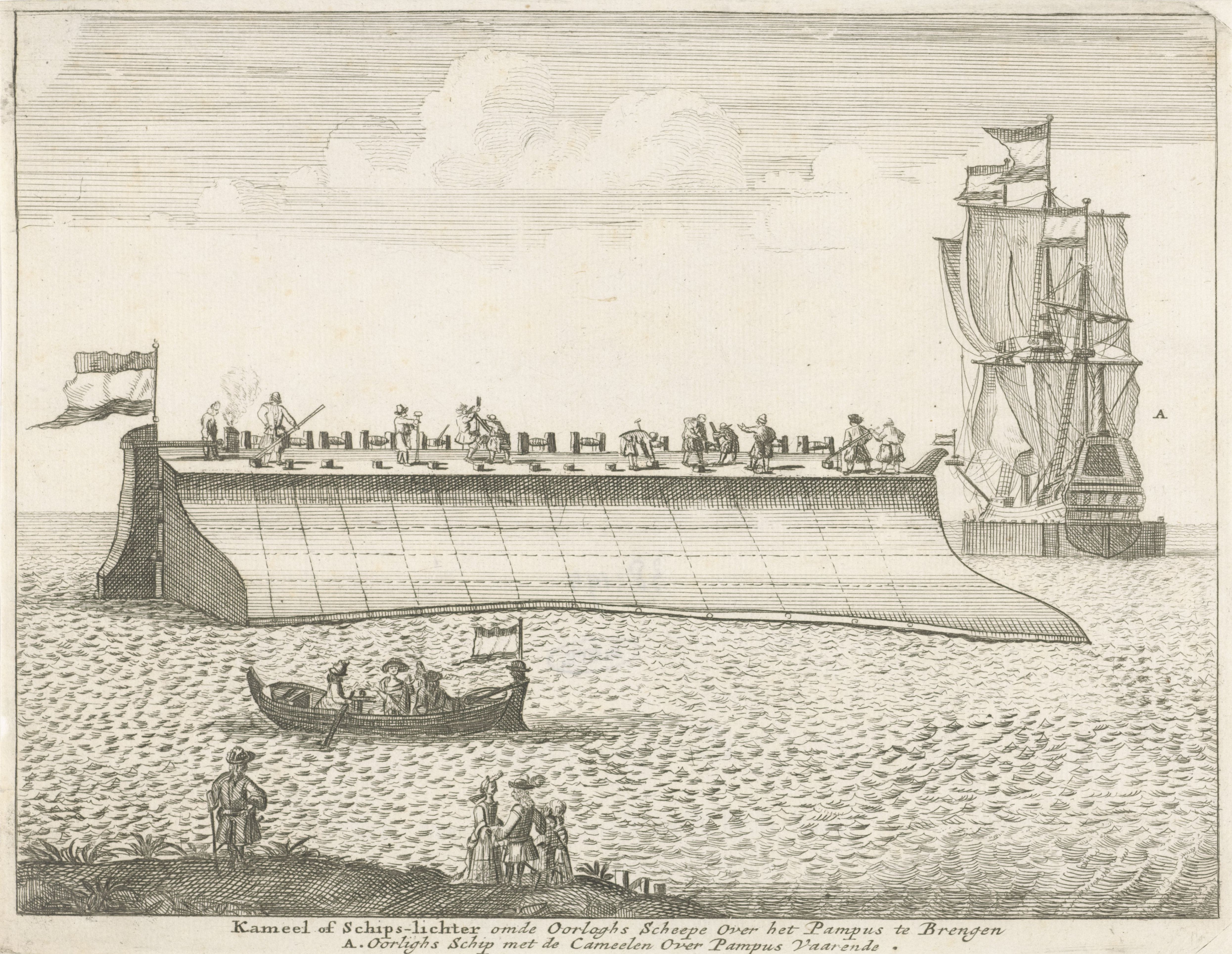 Kameel of Schips-lichter om de Oorloghs Scheepe over het pampus te brengen ... (titel op object) Objecttype prent Zogenaamde kameel of scheepslichter om schepen over Pampus te brengen. Bij de letter A de scheepslichter in werking, waarbij een zeilschip op de kameel ligt.